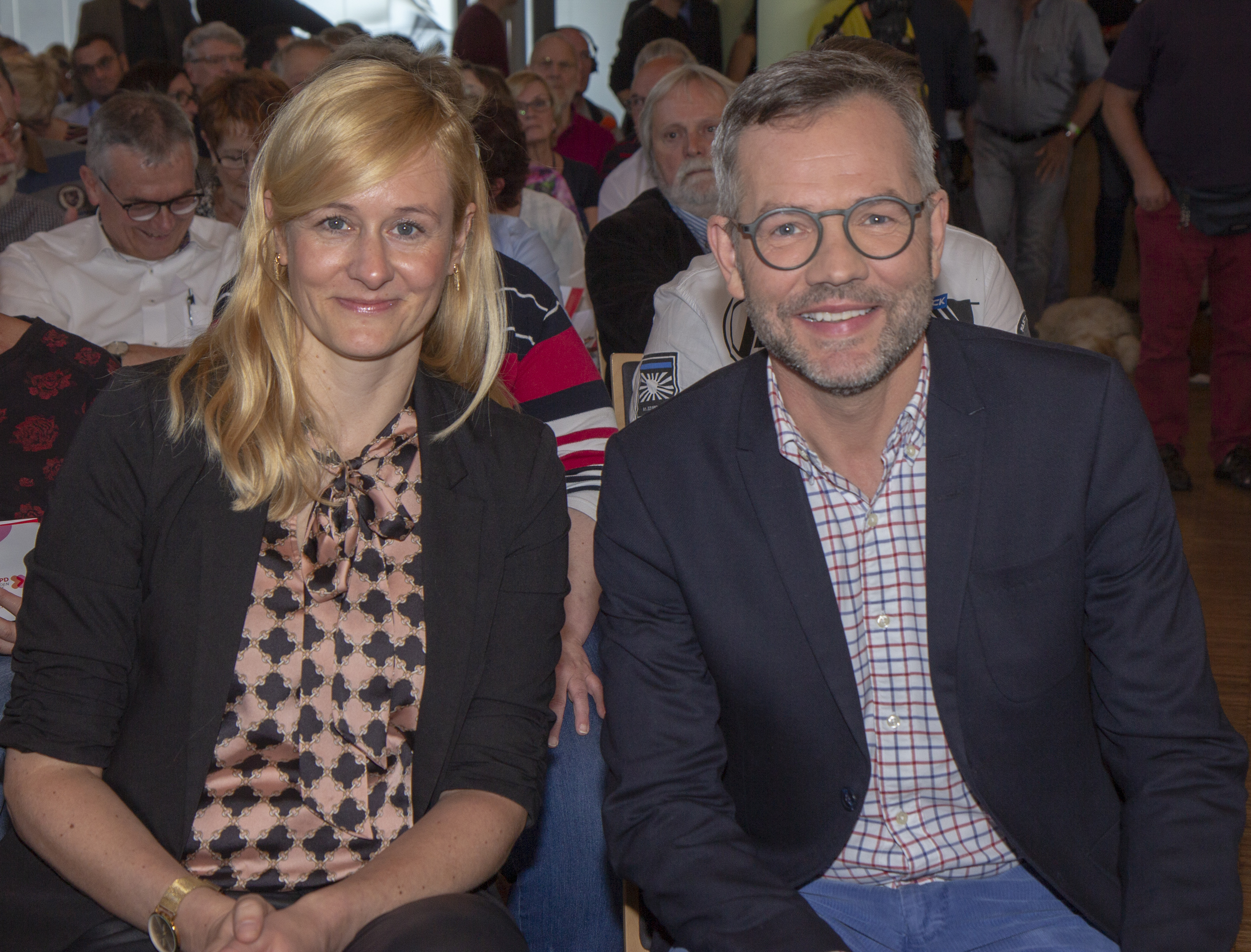 Team Christina Kampmann und Michael Roth bei der SPD Regionalkonferenz zur Wahl des SPD-Vorsitzes am 10. September 2019 in Nieder-Olm.